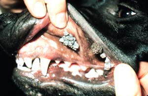 Canine oral papillomas; viral papillomatosis